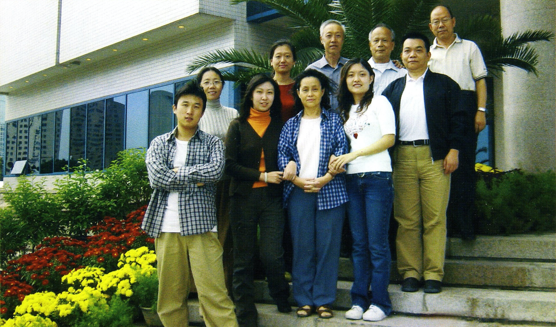 Esperanto-Redakcio de Ĉina Radio Internacia